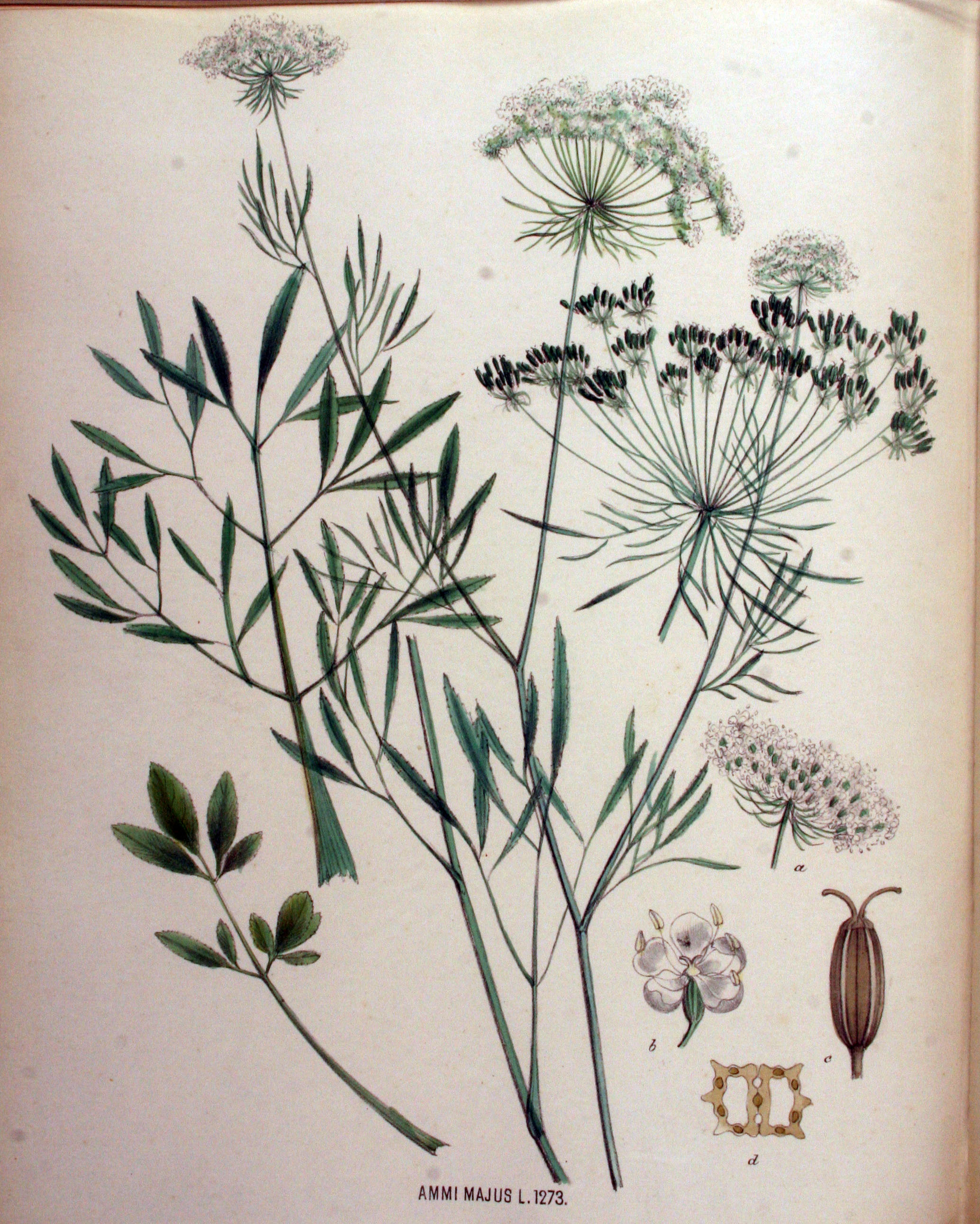 Ammi majus L.